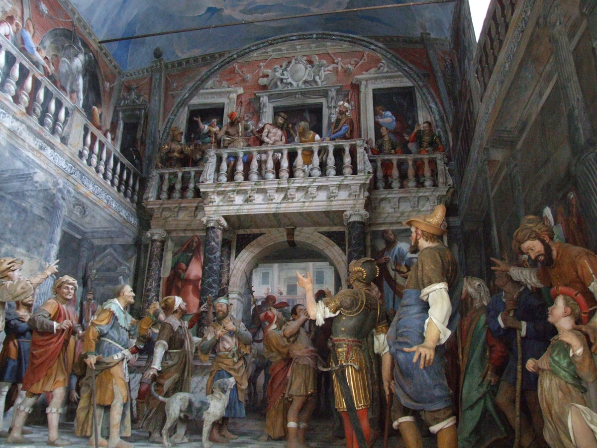 Chapel 33 - Ecce homo - Polychrome clay statues by Giovanni d'Enric and frescos Sacro Monte di Varallo Native nameSacro Monte di VaralloLocationVarallo Sesia, Piedmont, ItalyCoordinates45° 49′ 10.95″ N, 8° 15′ 19.01″ E WebsiteSacro Monte di Varallo